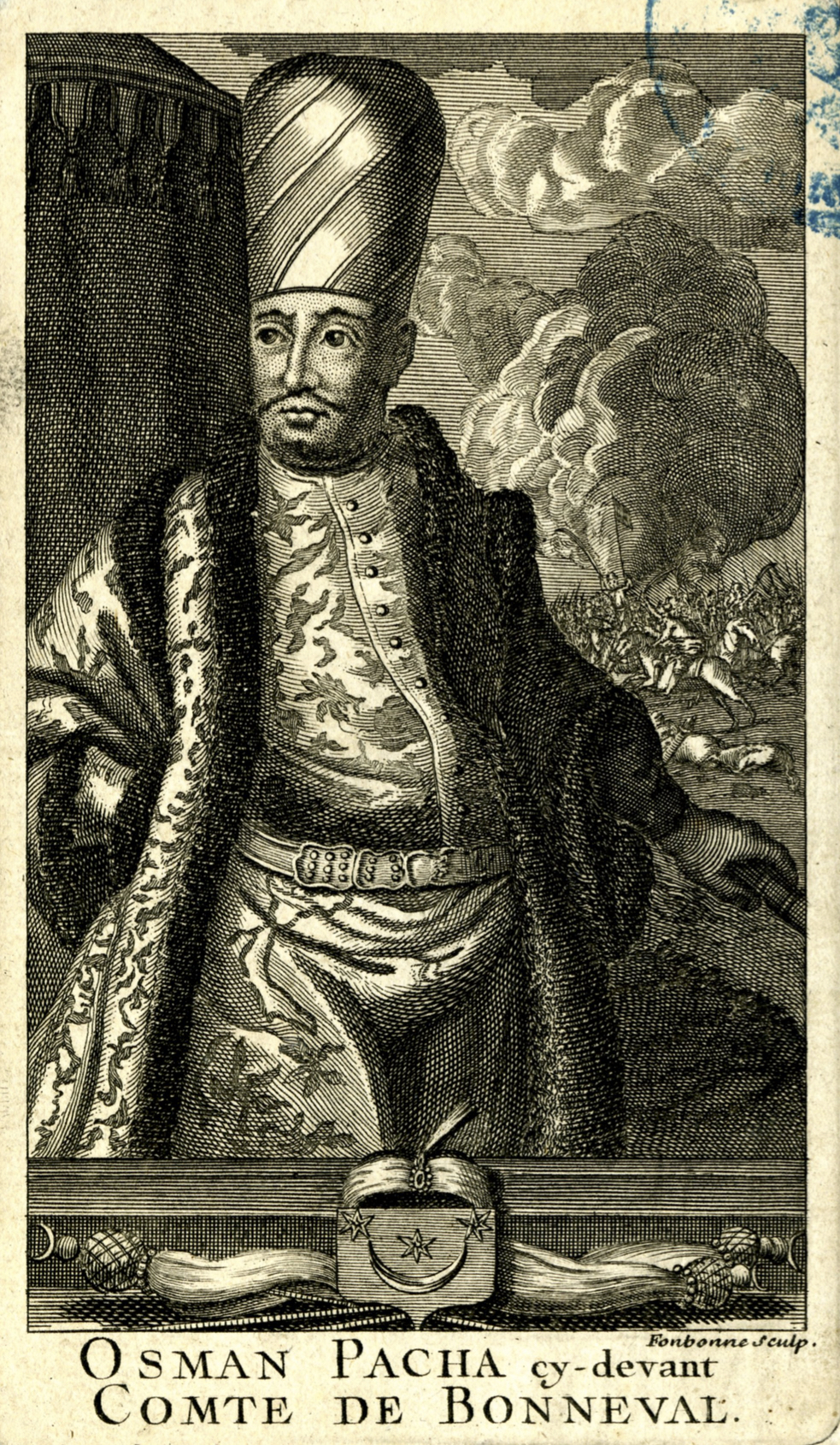 Osman Pacha, Comte de Bonneval, gravure de Fonbonne, 1755, Bibliothèque francophone multimedia-Ville de Limoges, Cote : FP BONN.